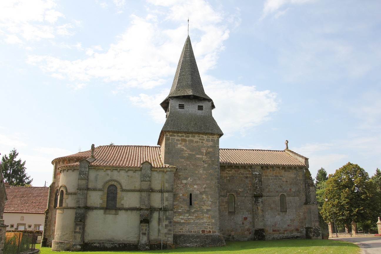 Louroux Bourbonnais Eglise St Martin exterieur